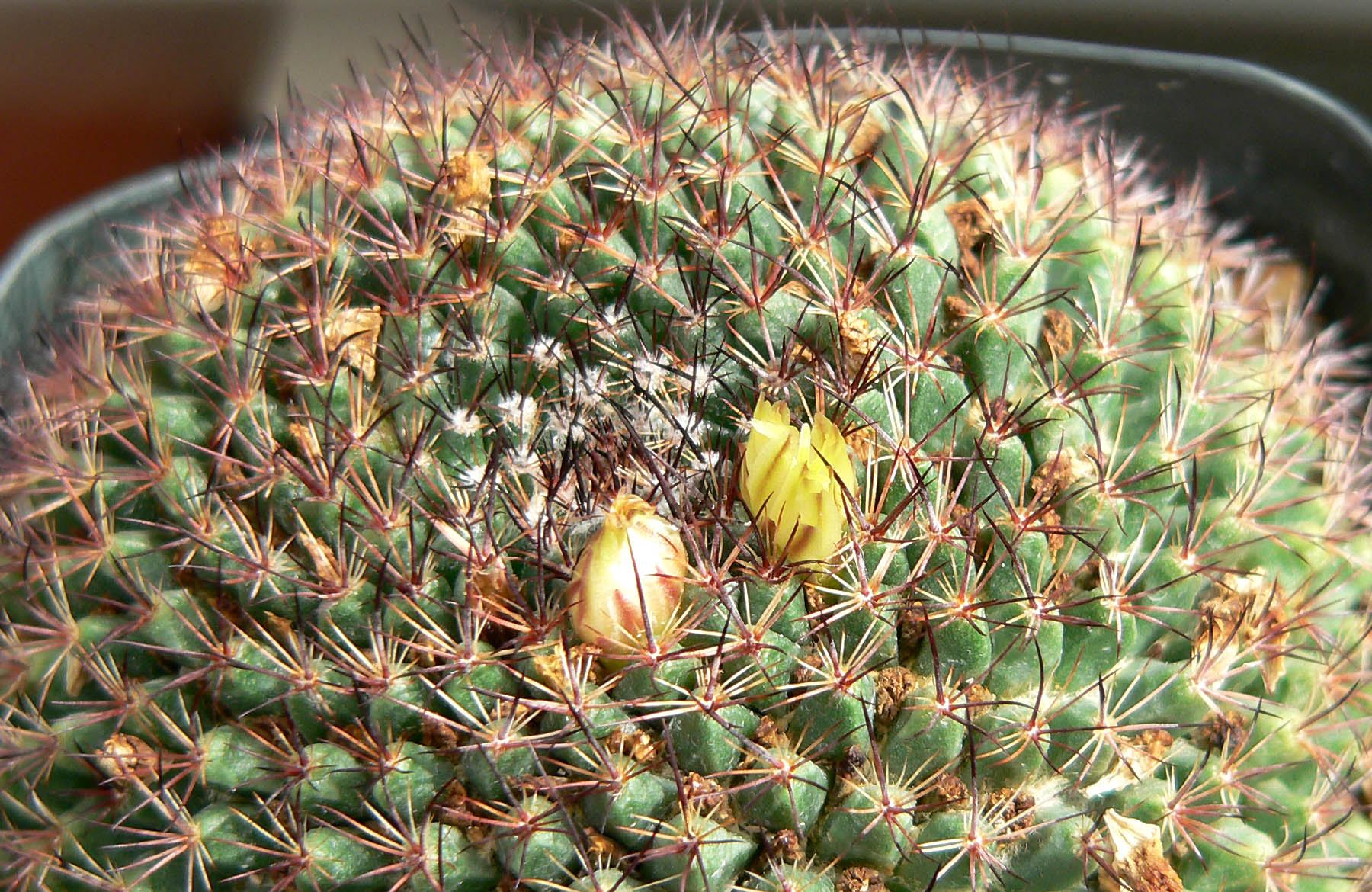 Mammillaria brandegeei subsp. glareosa Photo of Mammillaria dawsonii at the University of California Botanical Garden